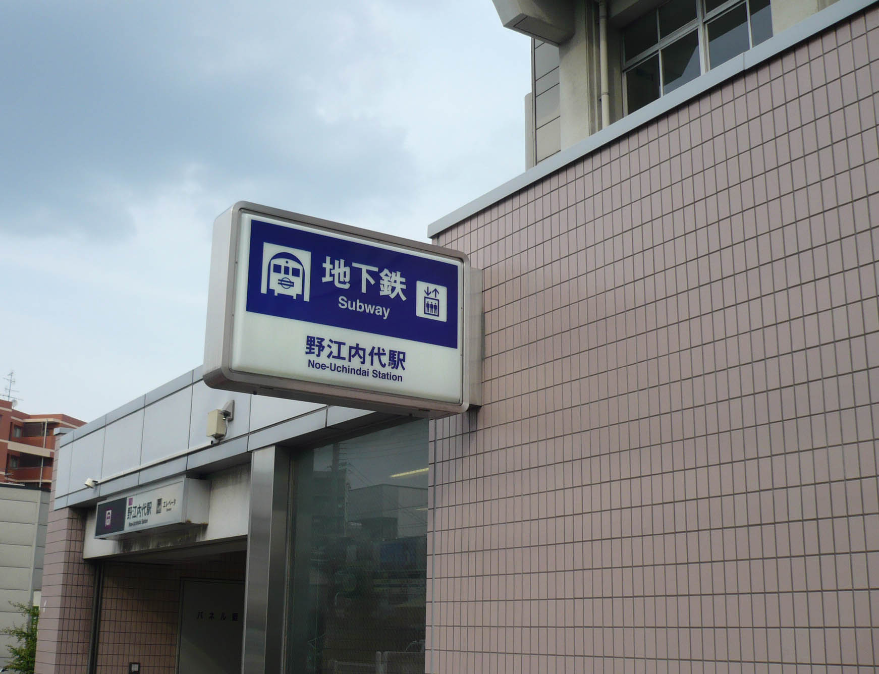 地下鉄 野江内代駅